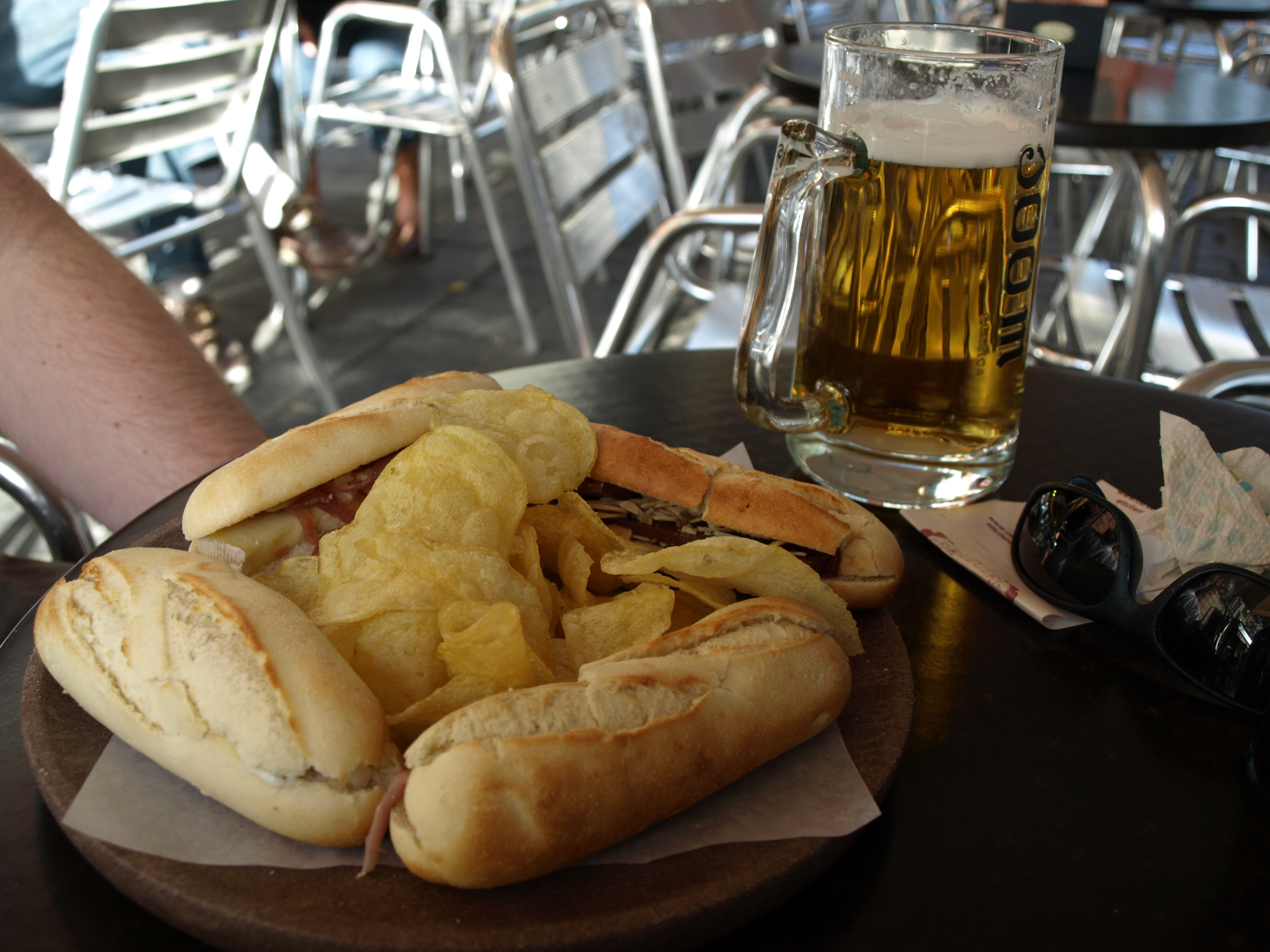 Plato de montaditos y jarra de cerveza, en un establecimiento de la cadena 100 Montaditos, en Madrid.